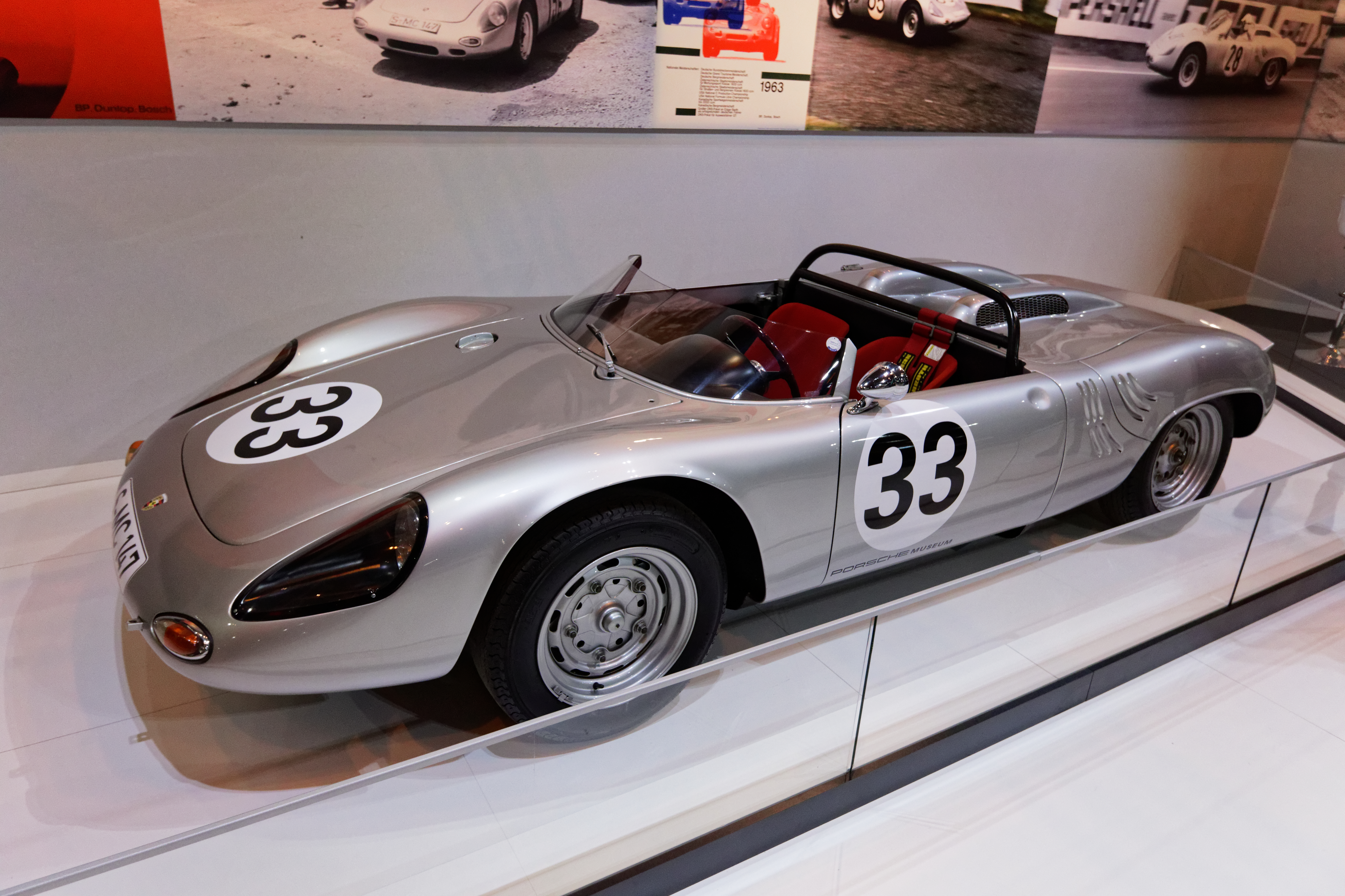 Une Porsche 718 X-RS Spyder de 1961 exposée lors du salon Rétromobile 2016.